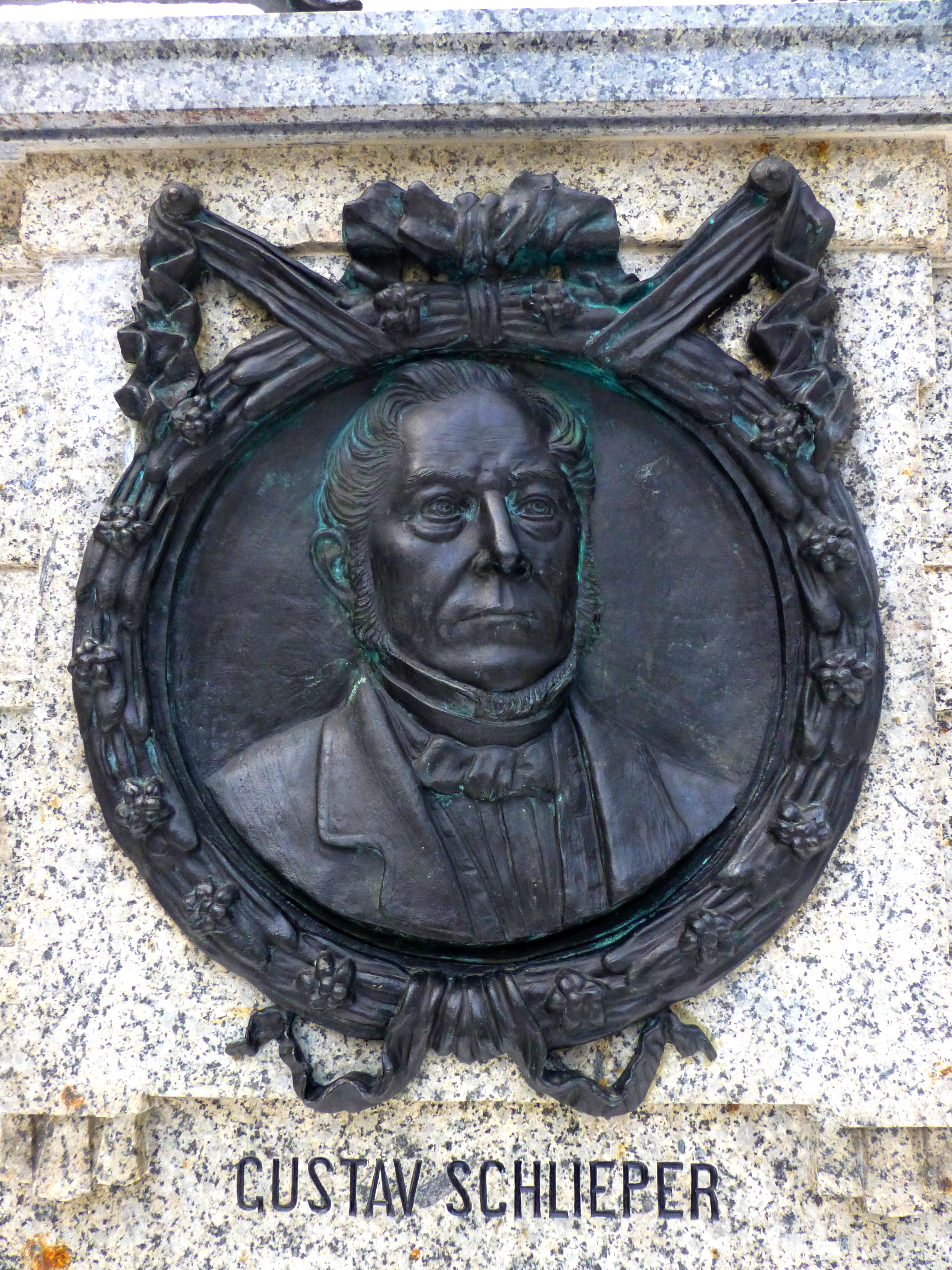 Wuppertal - Porträtmedaillon von Gustav Schlieper -1837 bis1899- am Armenpflegedenkmal in Elberfeld